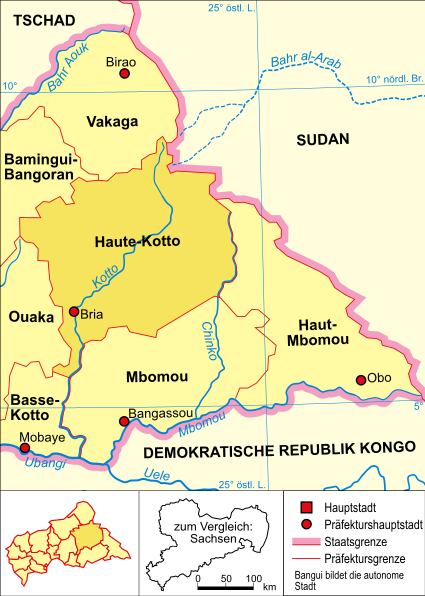 politische Karte der Zentralafrikanischen Republik (Präfektur Haute-Kotto hervorgehoben)